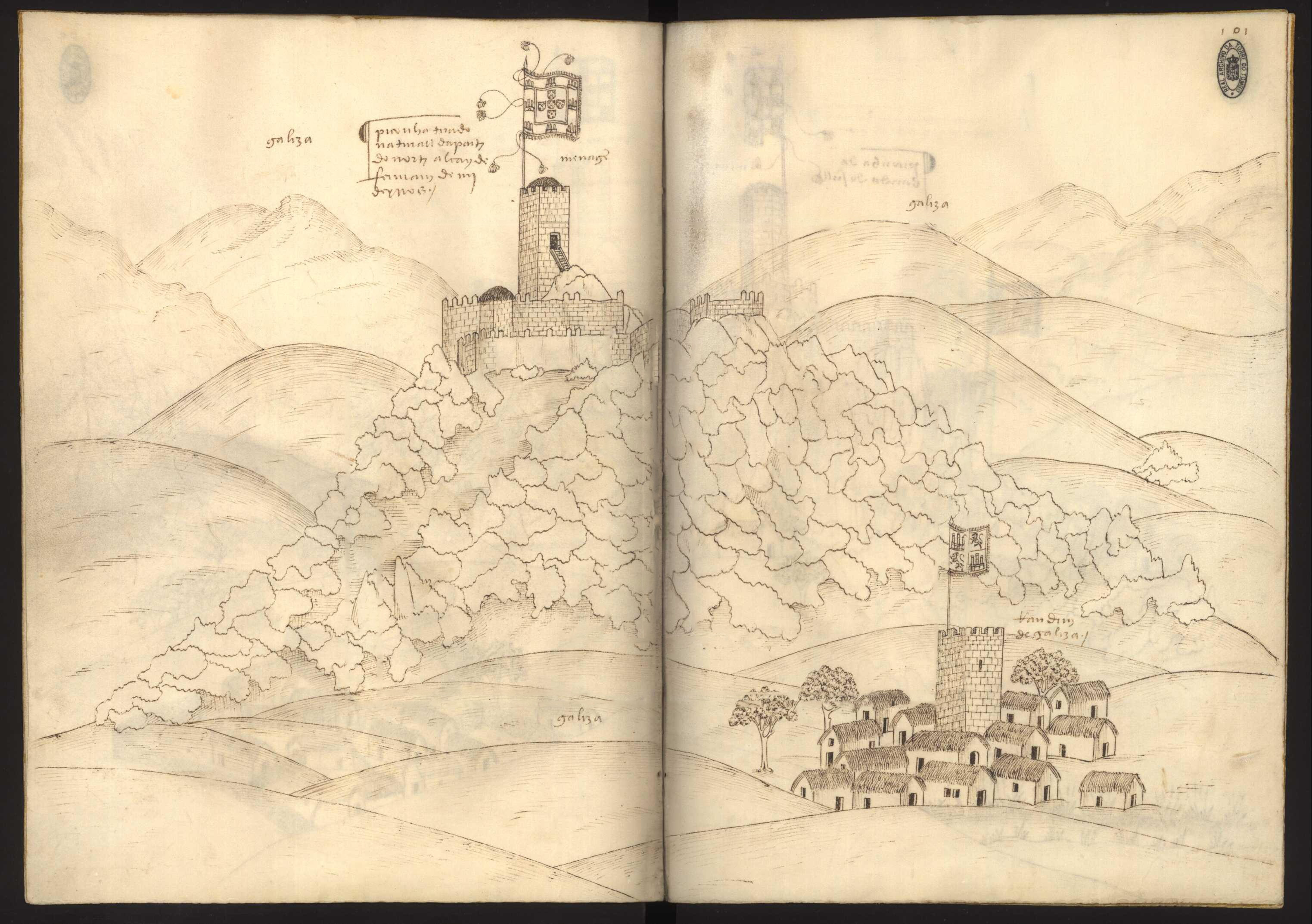 O Castelo da Piconha e mais Randín no Livro das Fortalezas.